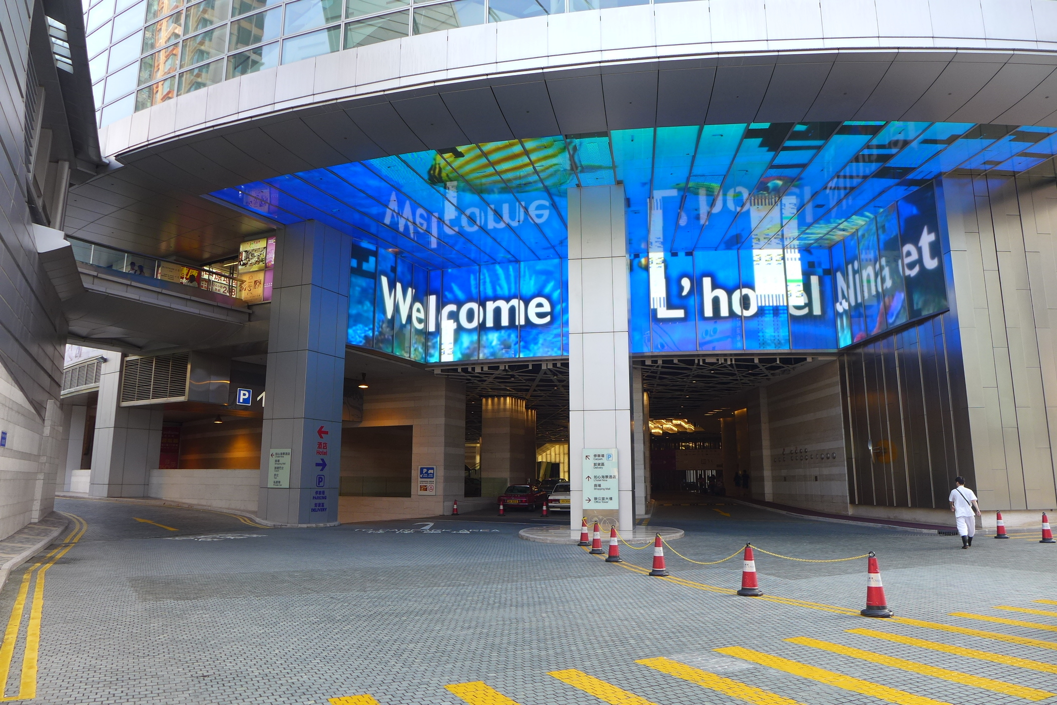 L'hotel Nina et Convention Centre Entrance ceiling